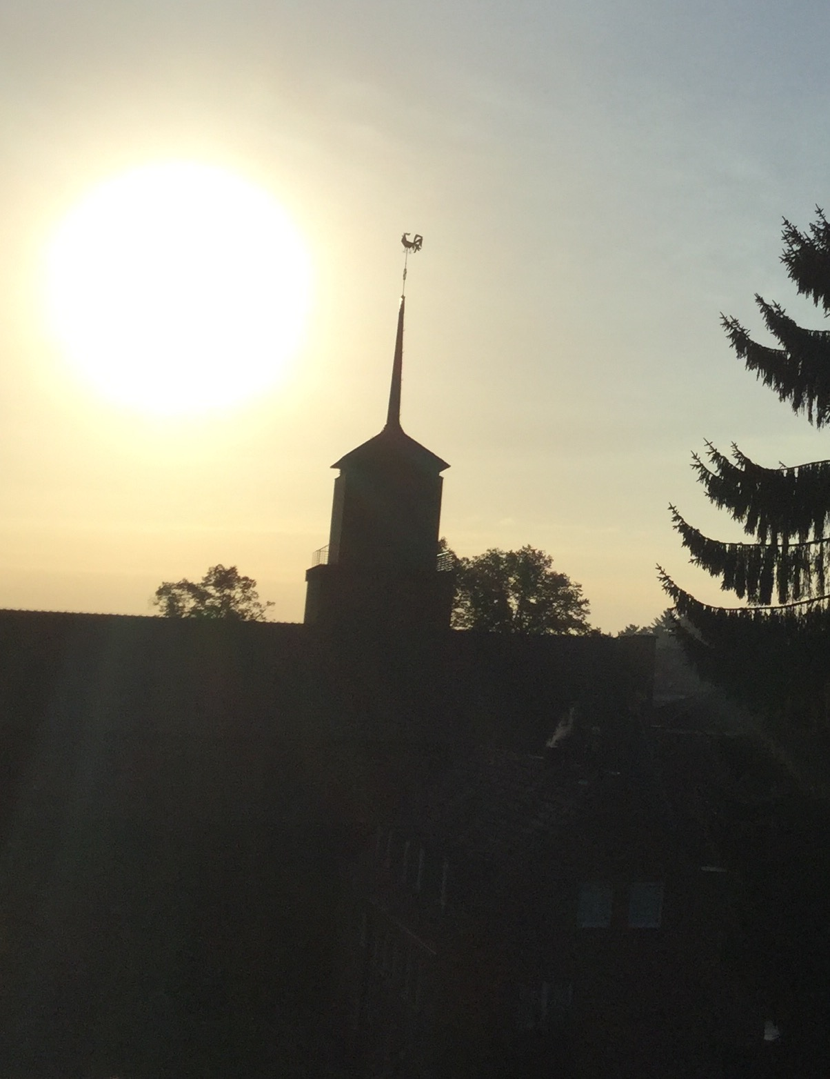 Sonnenaufgang Hl. Kreuz Mönchengladbach